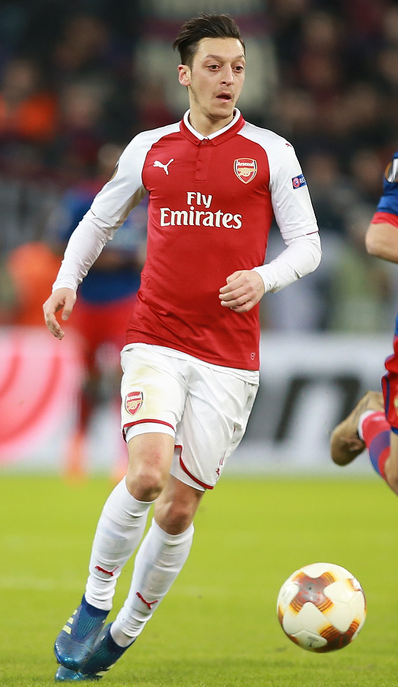 ЦСКА упустил победу над «Арсеналом» и покинул Лигу Европы